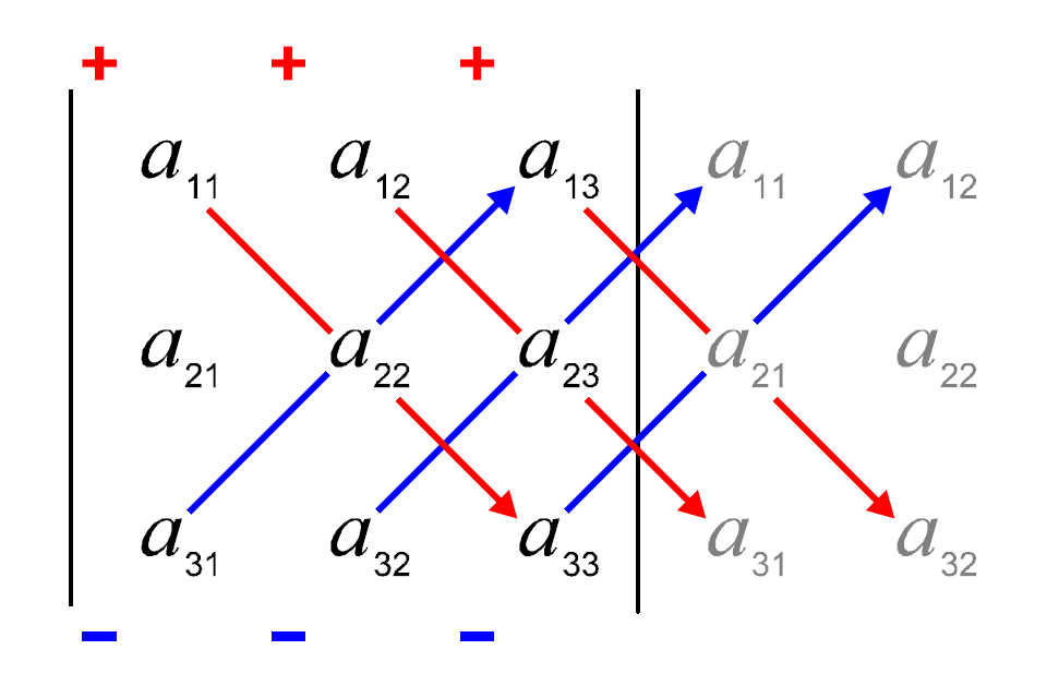 Berechnung der Determinanten einer Matrix dritter Ordnung nach der Regel von Sarrus